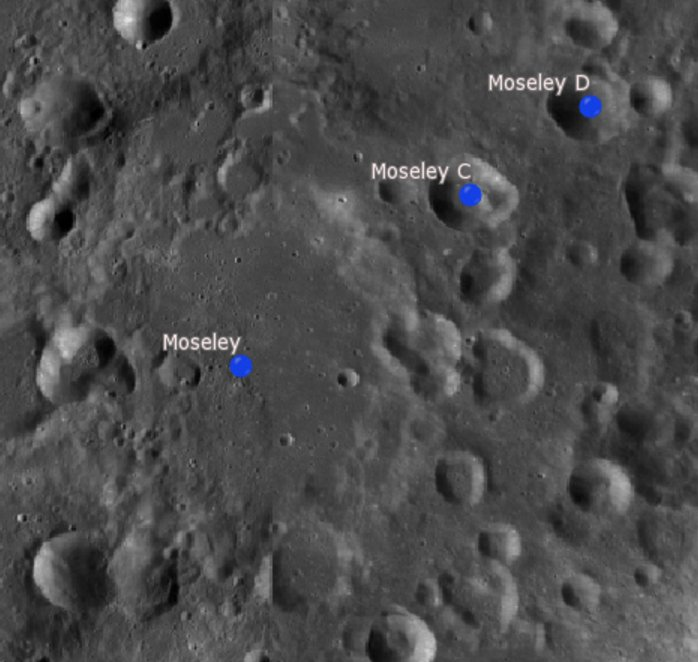 Cráter lunar Moseley. Cráteres satélite. (Imagen LRO)